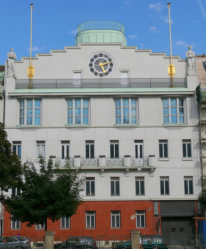 Verwaltungs-/Bürogebäude, Vorwärts-Verlag